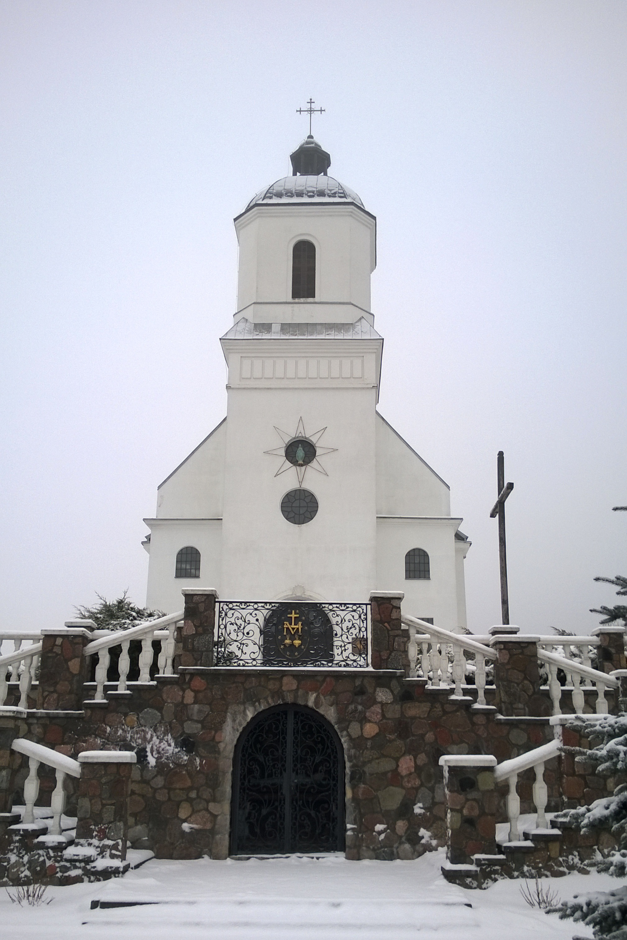 Kapcioŭka, Belarus